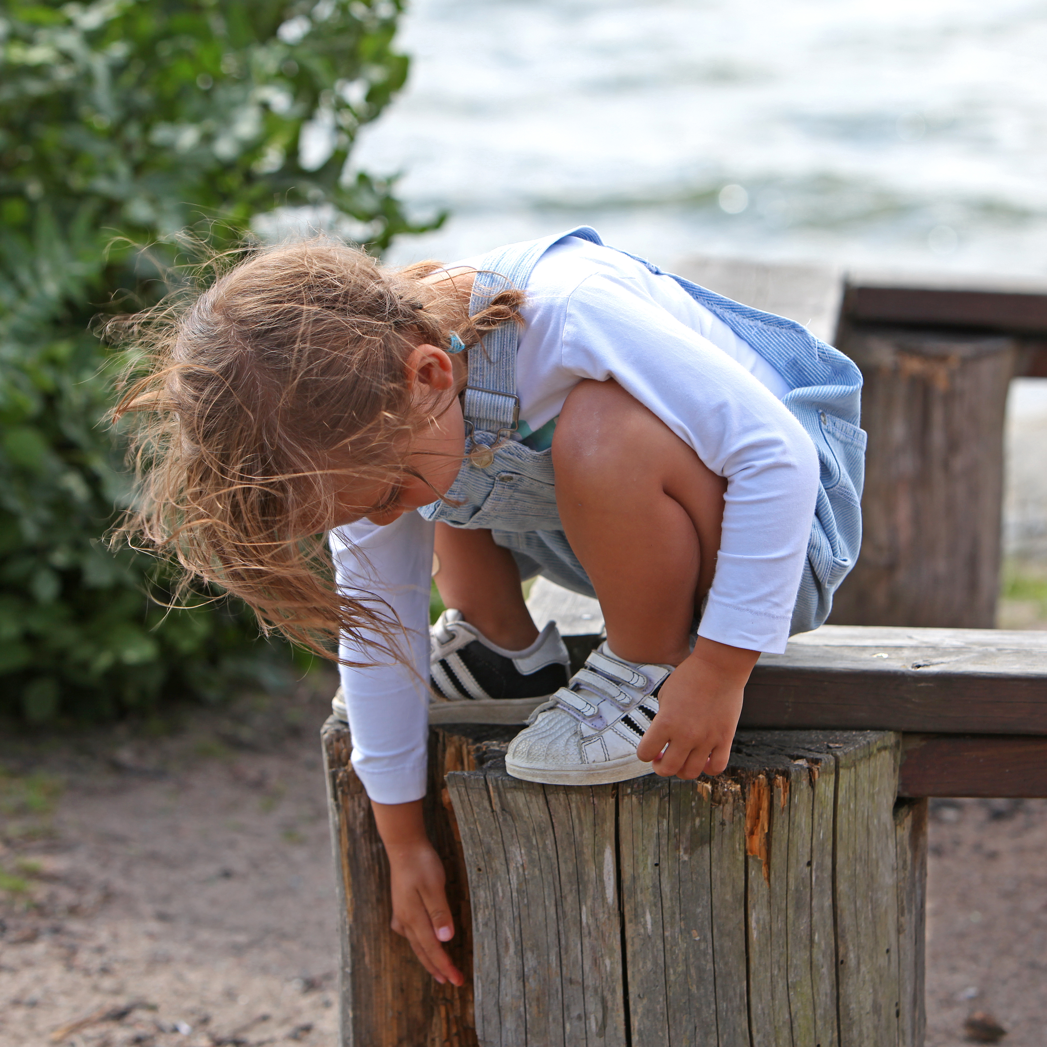 Publik vid Maraton Kanot SM 2009.